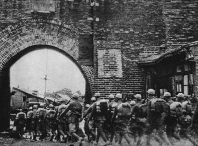 1945年12月31日，被八路军大部队和地方武装围困多日的守城伪军弃城南逃，八路军随即开进遵化城，遵化城及全境宣告解放。当时，遵化县隶属于冀热辽区十五专署，王学黎同志担任中共遵化县委书记、代理遵化县政府县长，下辖东新庄、团瓢庄、梨源头、关山口和城关等十四个区。